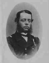 Mořic Daublebský ze Sternecku (1834-1917), velitelem válečné školy ve Vídni